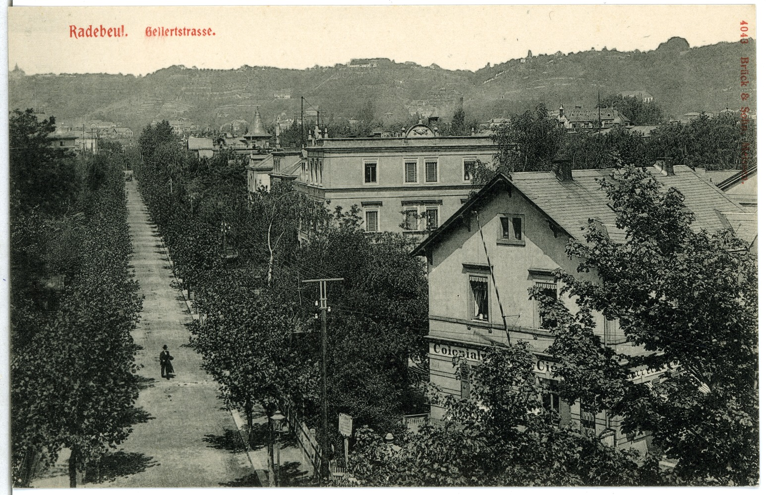 Radebeul; Gellertstraße This postcard is from publisher Brück & Sohn in Meißen ( postcard has a unique number 04043 and is available in a higher resolution at the publisher. This images was uploaded in a cooperation project between Wikipedians and the publisher.